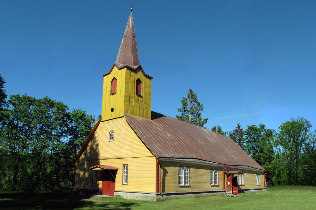 Järvakandi Peetri kirik